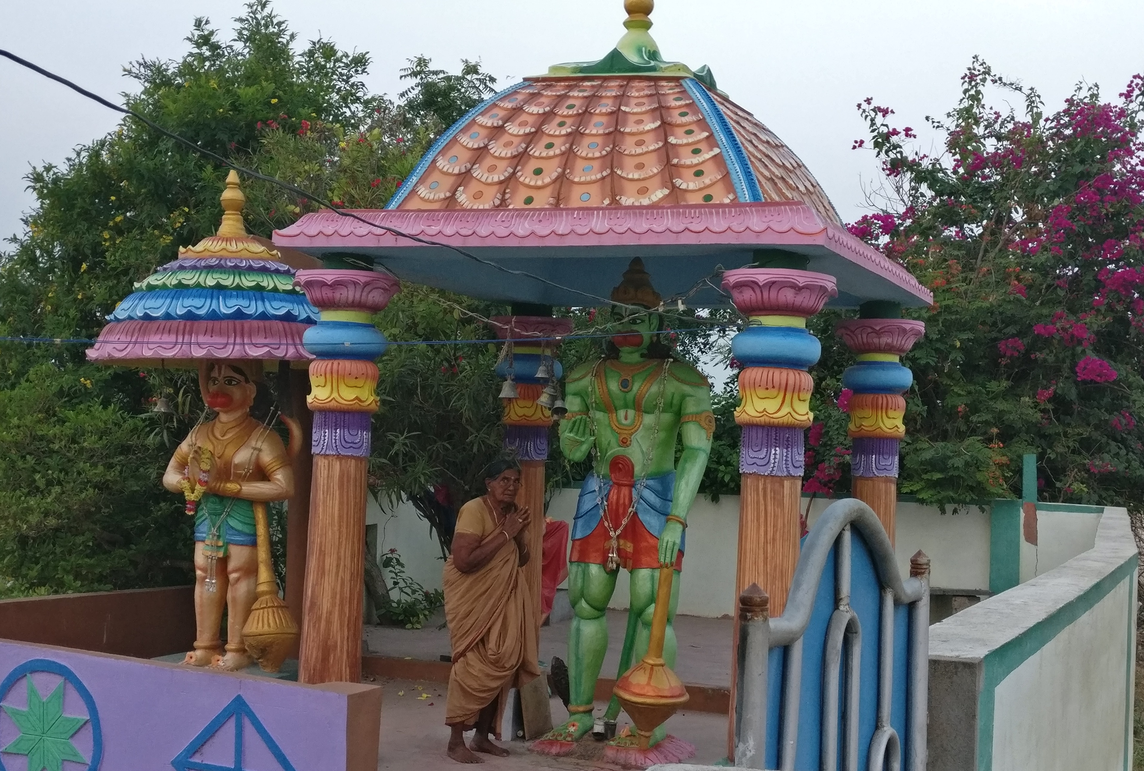 వివాహానికి ముందు వెంకటేశ్వర స్వామికి ఎదురు నడిచే ప్రతి ఒక్కరూ ఊరికి దక్షిణాన ఉన్న నాగార్జునసాగర్ కాలువ దగ్గర ఉన్న ఈ ఆలయానికి వచ్చి పూజలు చేయాల్సిందే. ఇక్కడ పూర్వకాలం నుంచి ఈ ఆచారం ఉంది.